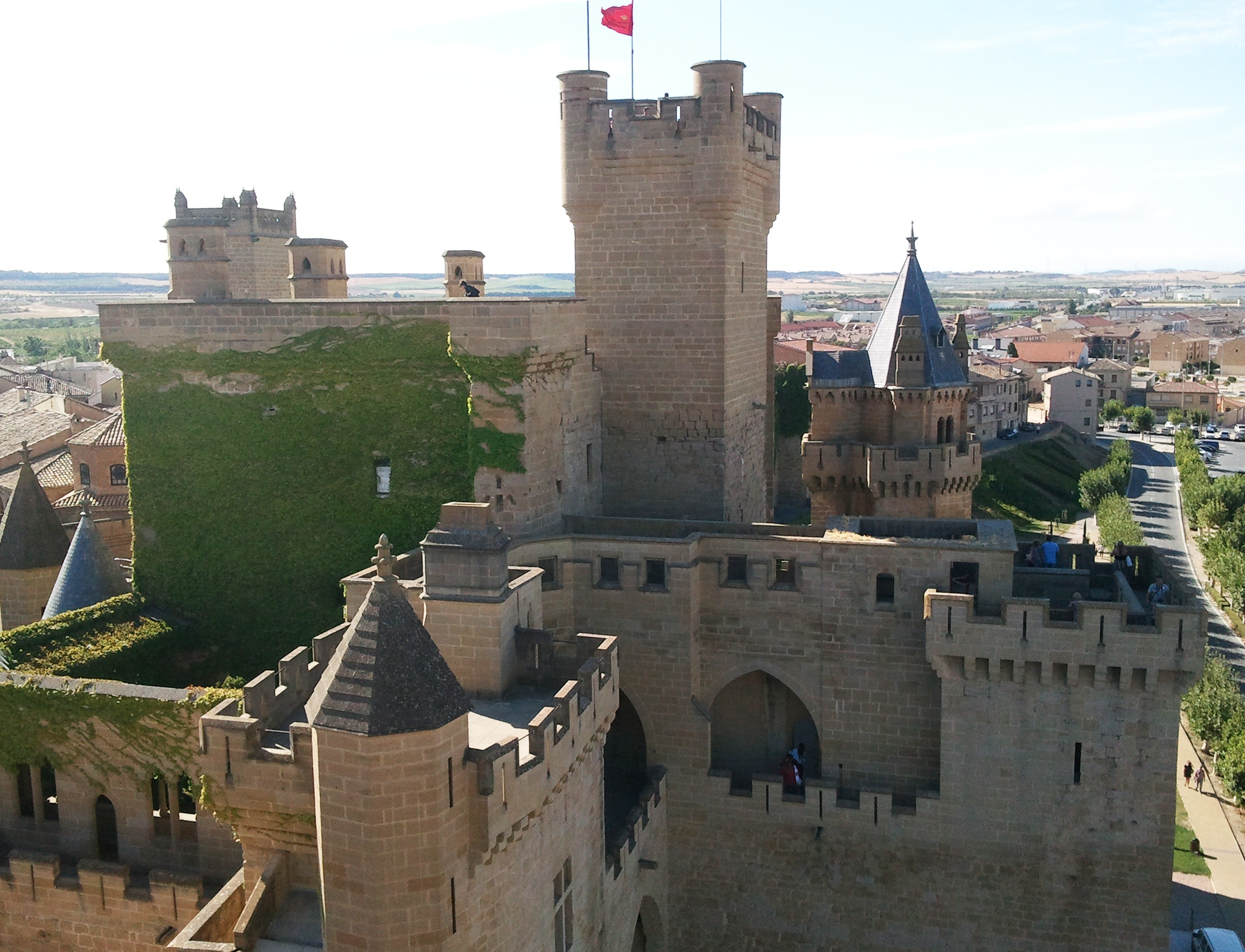 Castillo de Olite, siglo XIII y XIV. El pueblo está a 60kms de Tudela, 145km de Zaragoza. Merece la pena aunque el interior esté completamente vacío.